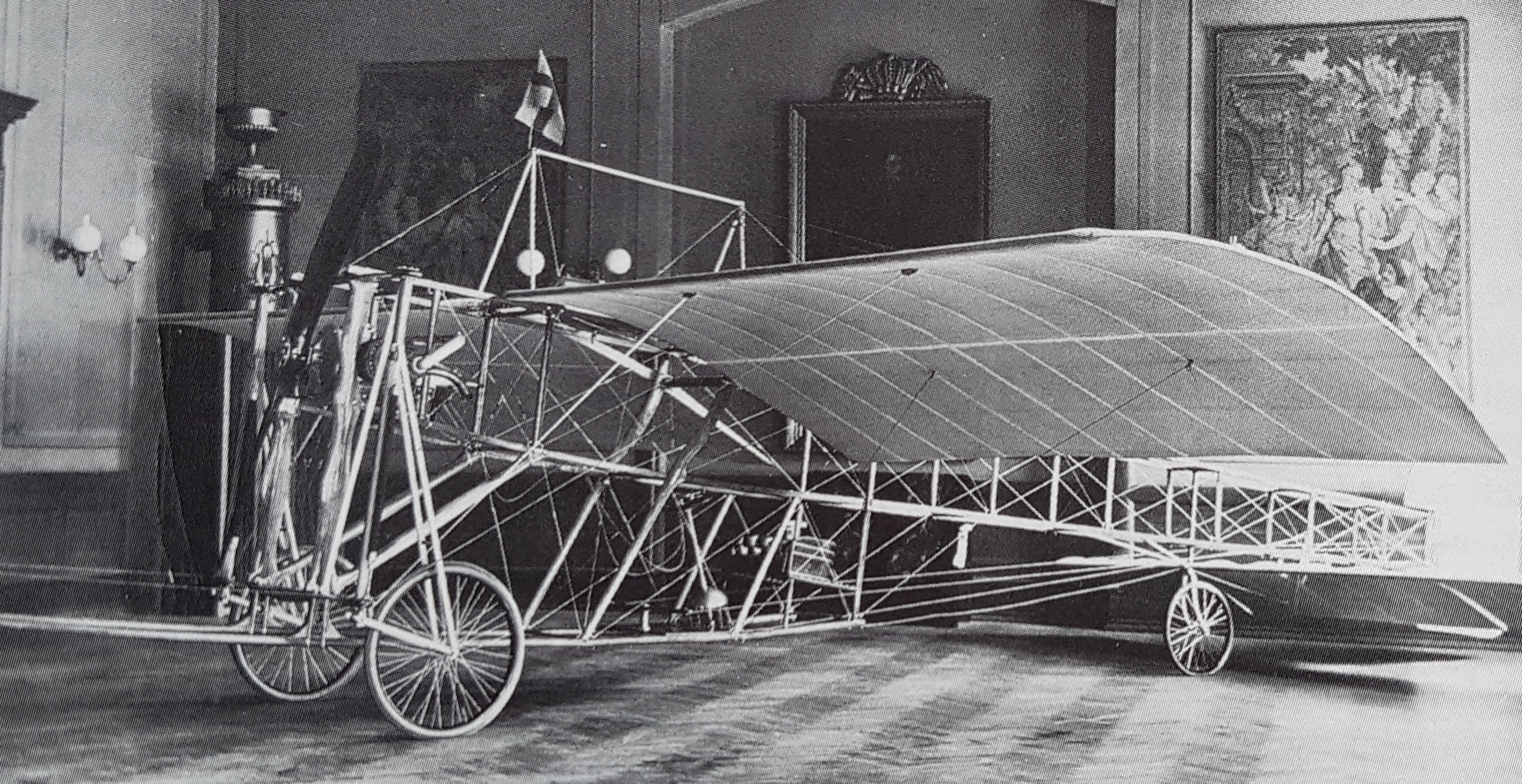 Nyrop och Asks flygplan visas på Stadshotellet Landskrona